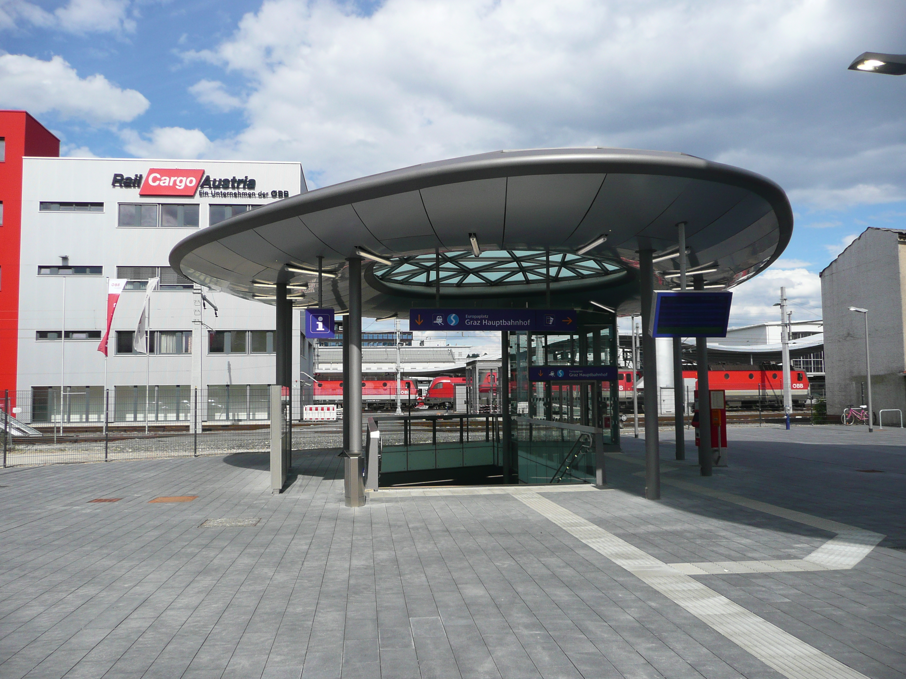 Hauptbahnhof Graz - Personentunnel Nord - Blickrichtung Ost - Abgang Waagner-Biro-Straße